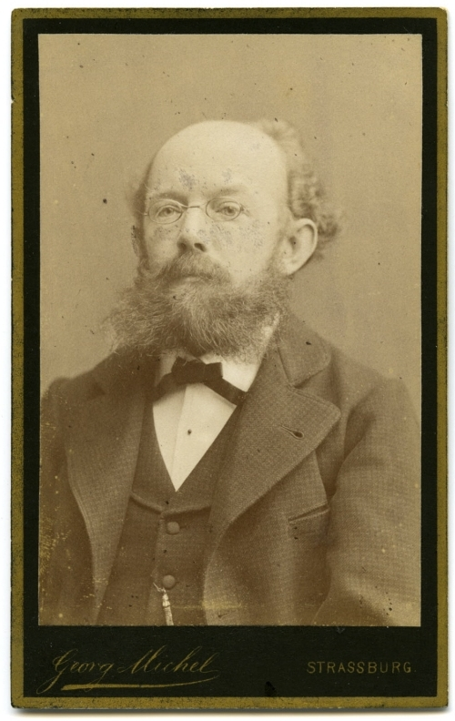 Porträt von Wilhelm Schur in Straßburg, zwischen 1873 und 1886.